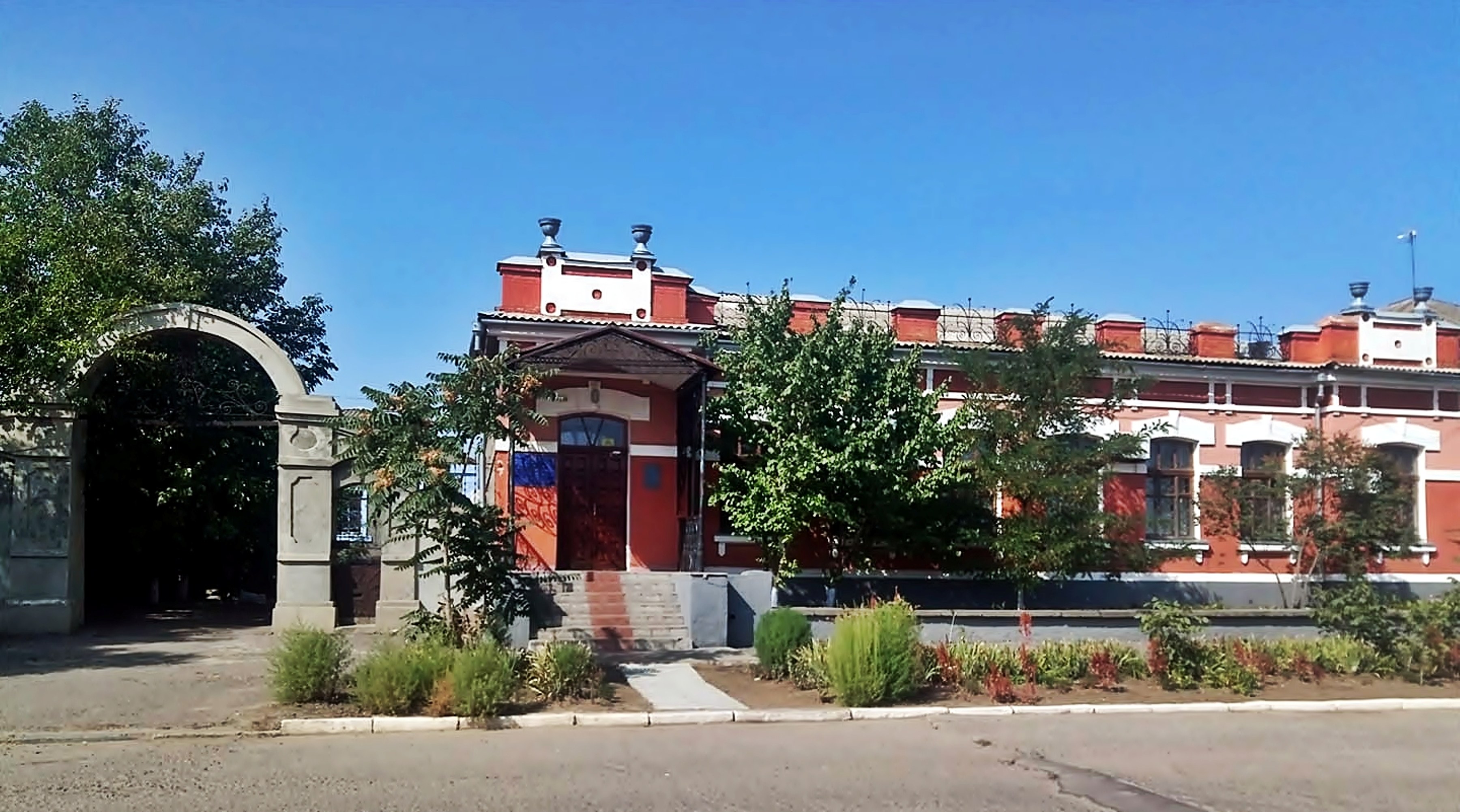 Кредитне Товариство, Снігурівський район, Місто Снігурівка, вул. 200-річчя Снігурівки, 118